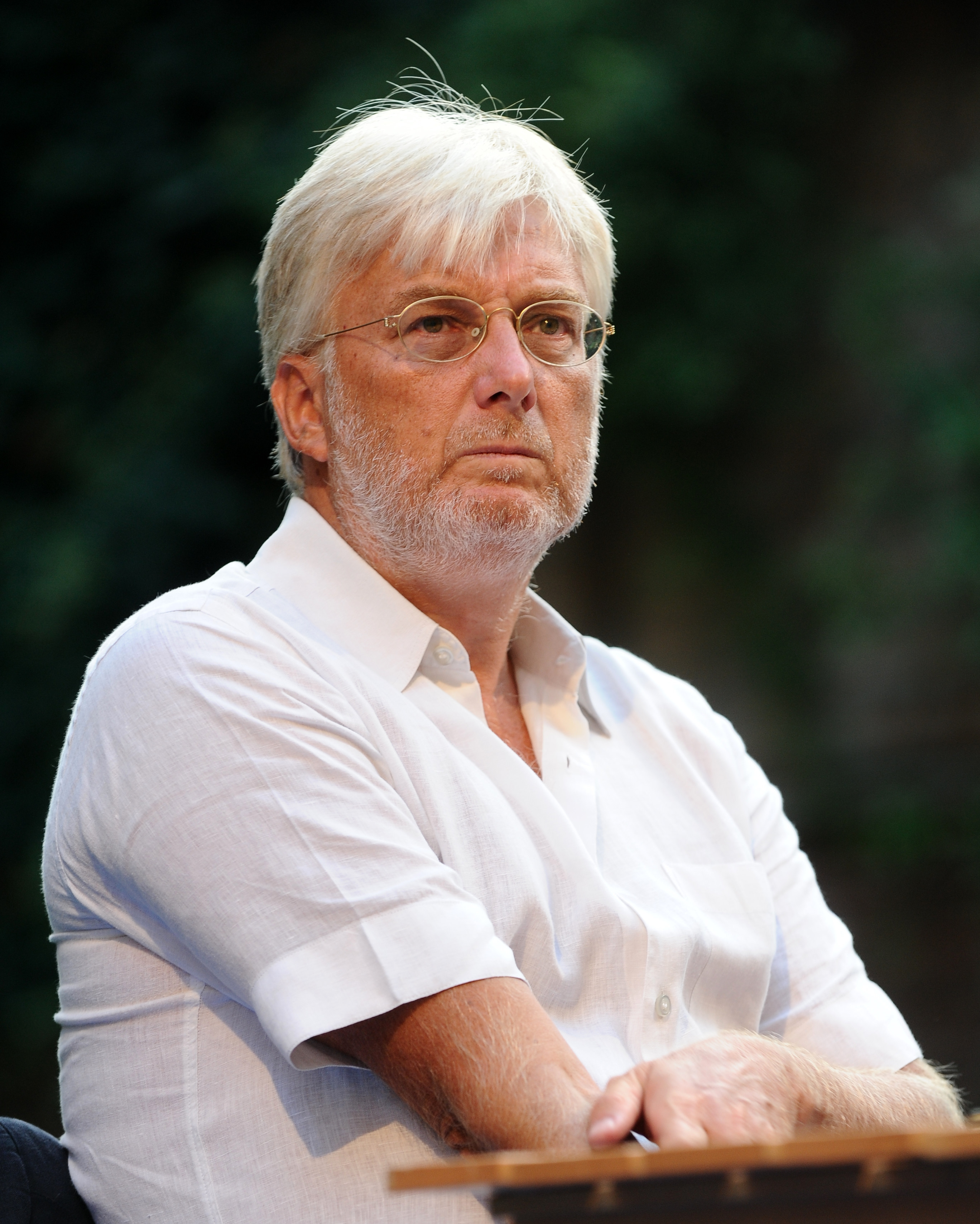 Silvio Perrella a Mantova per il Festivaletteratura 2012.